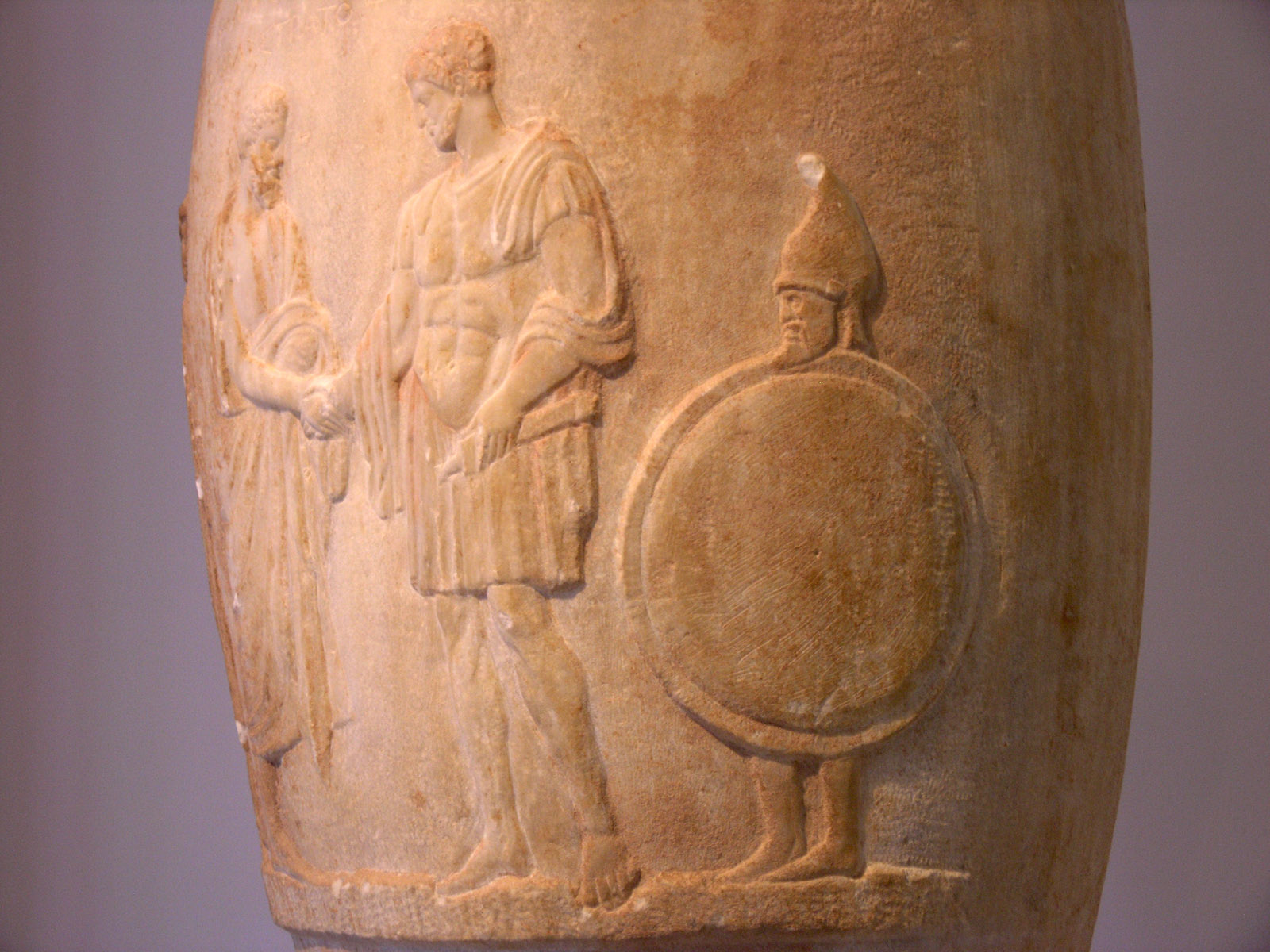 Loutrophoros funéraire, marbre pentélique. Confisqué au Pirée. Représentation d'un homme mur serrant la main d'un hoplite. Derrière lui, un jeune esclave portant le bouclier et le casque de son maître. Derrière à gauche, une figure féminine en deuil. Au-dessus des têtes des figures qui appartiennent toutes à la même famille, sont inscrits leurs noms: Stratokleia, Philopolis fils de Polystratos, Polystratos fils de Philopolis. Vers 380-370 a. C.